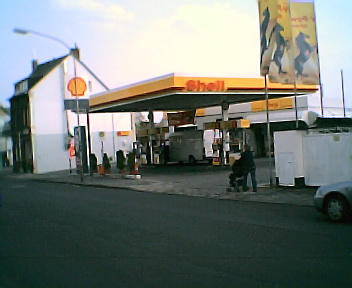 Benzinepomp (Shell) in Koblenz-Metternich. Foto van Andre Engels, en door hem in het publiek domein geplaatst.